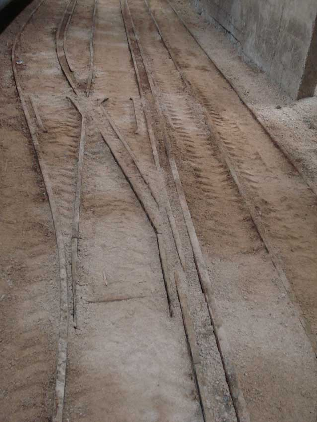 Pozzo Impero, Parco Tecnologico Archeologico delle Colline Metallifere Grossetane